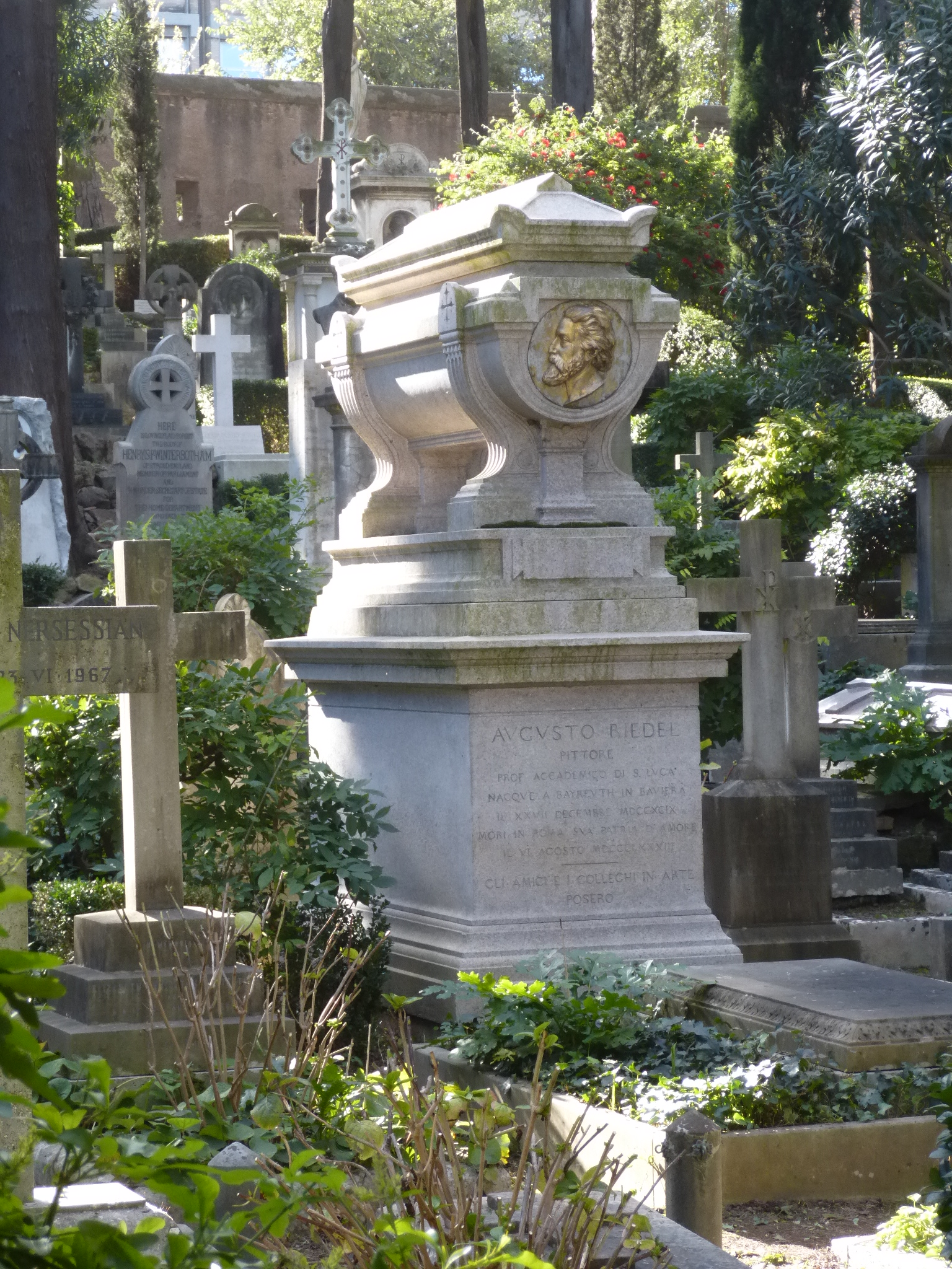 Roma, cimitero acattolico, tomba di Augusto (August) Riedel